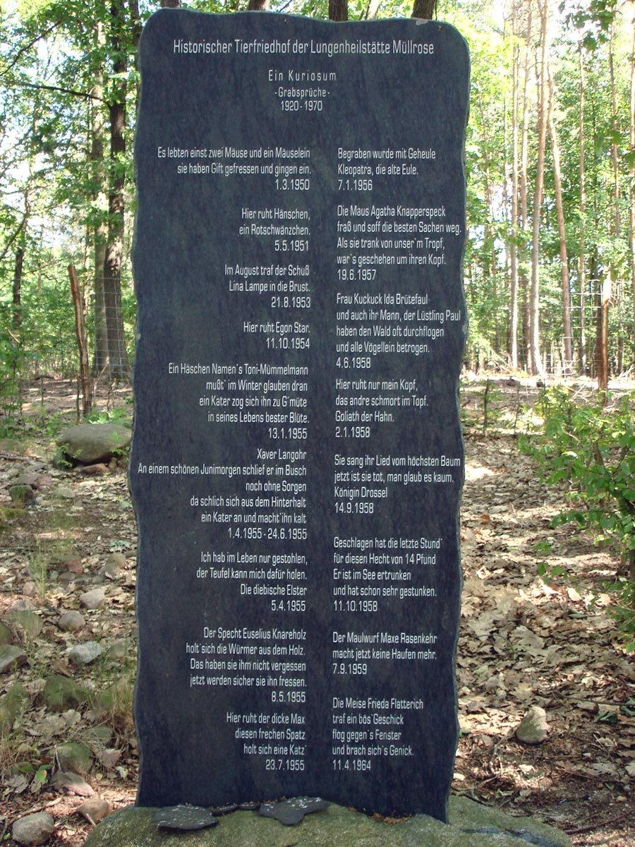 Müllrose - Tierfriedhof Zeisigberg